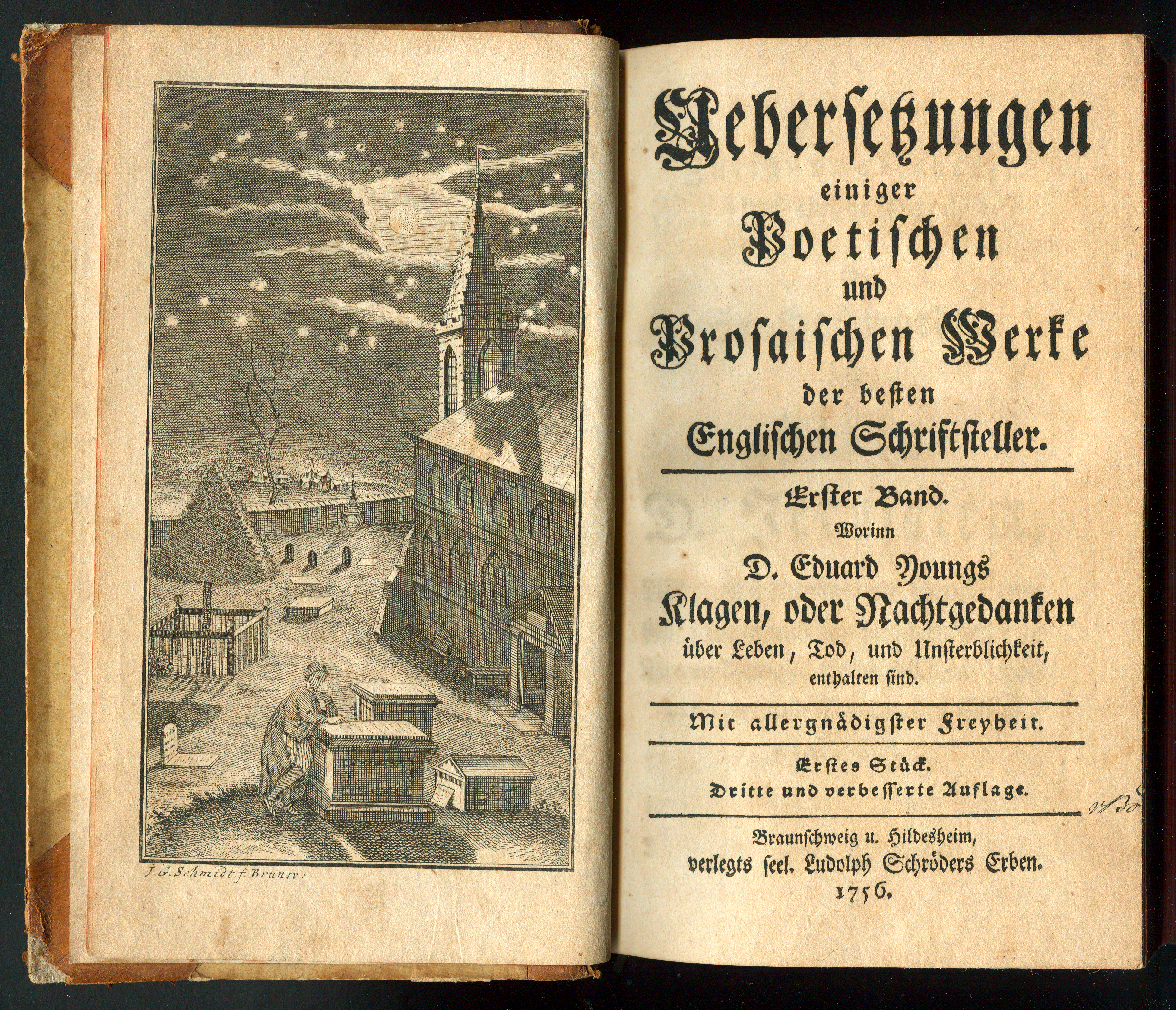 Frontispiz mit einem Kupferstich des Künstlers Johann Georg Schmidt zu Eduard Youngs „Klagen, oder Nachtgedanken über Leben, Tod, und Unsterblichkeit“ in der Übersetzung von Johann Arnold Ebert mit einer Zueignungsschrift an den Herrn D. Jerusalem. Dritte und verbesserte Auflage, Braunschweig und Hildesheim, 1756 verlegt bei Ludolph Schröders Erben ...